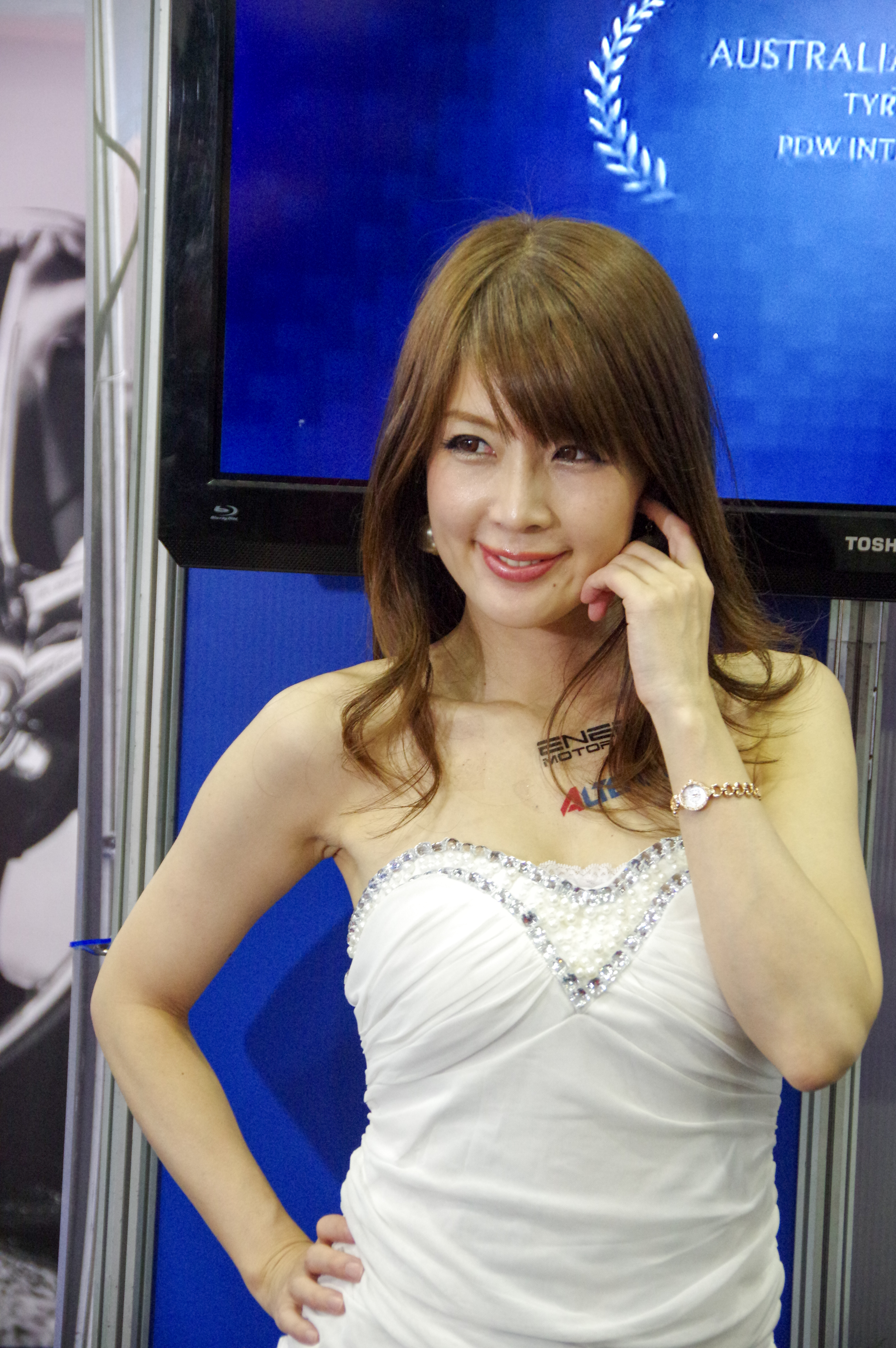 TOKYO AUTO SALON 2016 _101